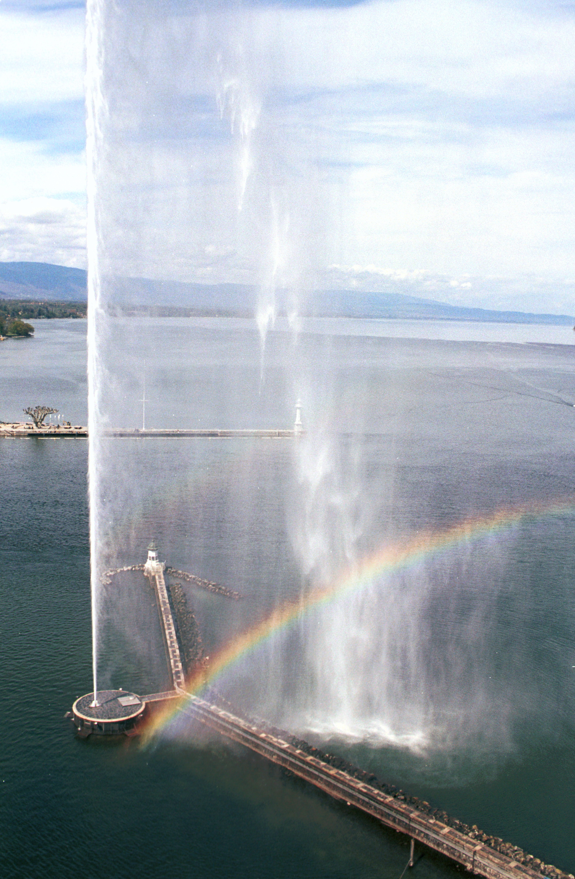 Photographie aérienne de Genève, le jet d'eau, le lac Léman, la rade, la jetée des Bains des Pâquis, le 26 avril 2005. Photo by User:ork.ch mailto:ork(at)ork.ch | (Genève)